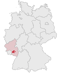 Landkreis Kaiserslautern, Rhineland-Palatinate, Germany